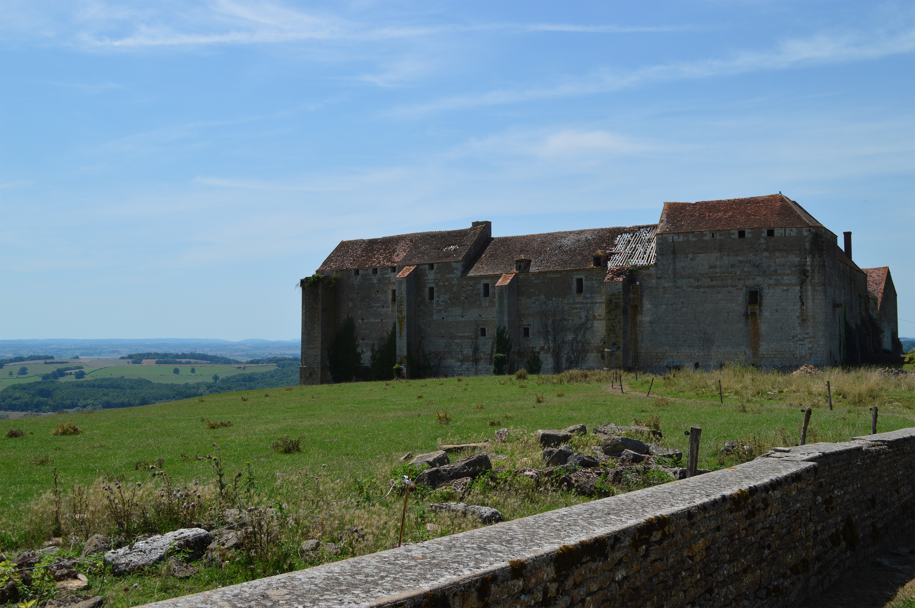 Cliché de la façade Est du château de Pisy réalisé en juillet 2014. .